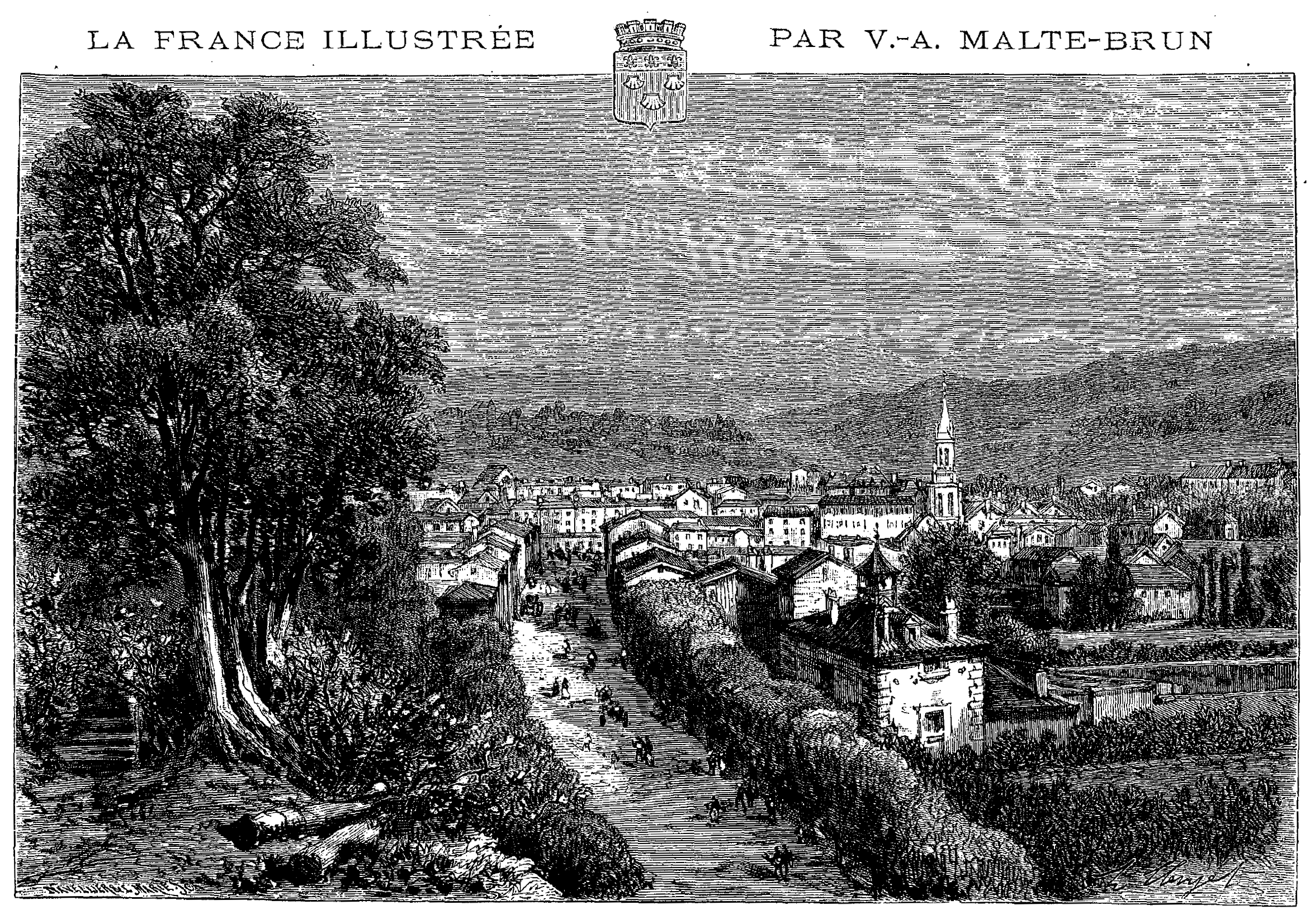 extrait de La France illustrée, géographie, histoire, administration, statistique, etc., tome I, par V.-A. Malte-Brun.